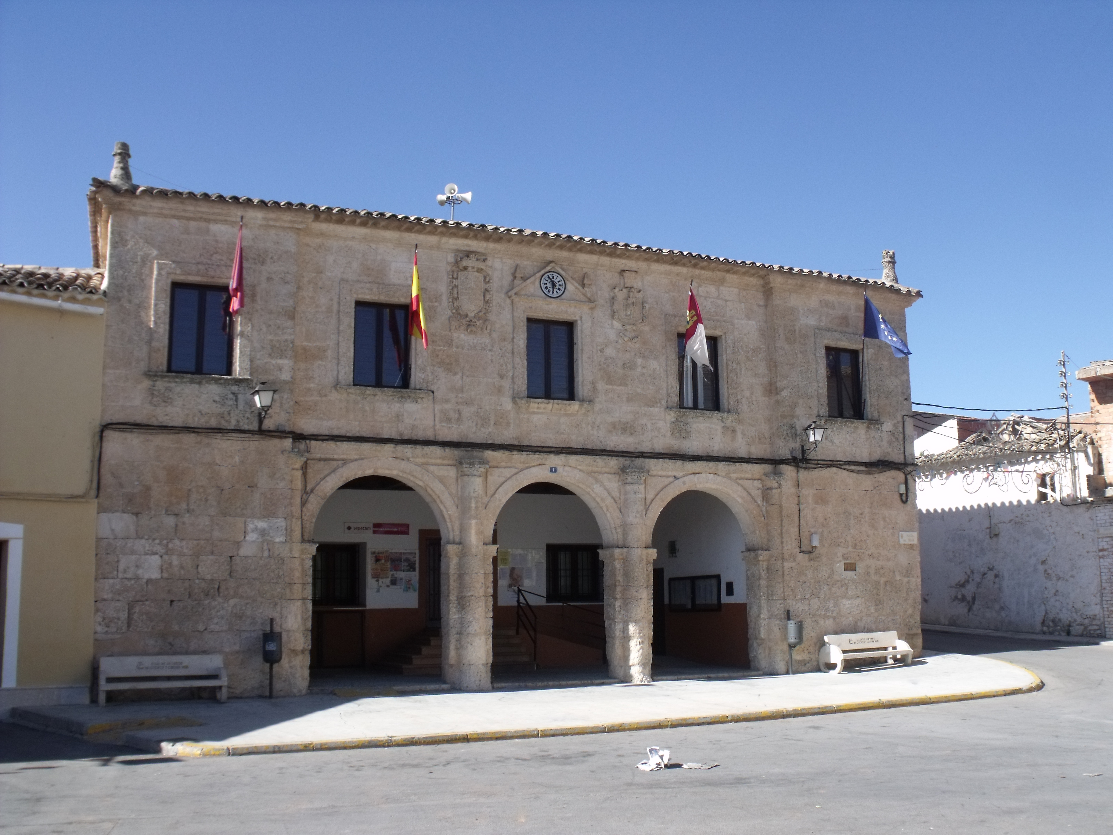 Ayuntamiento